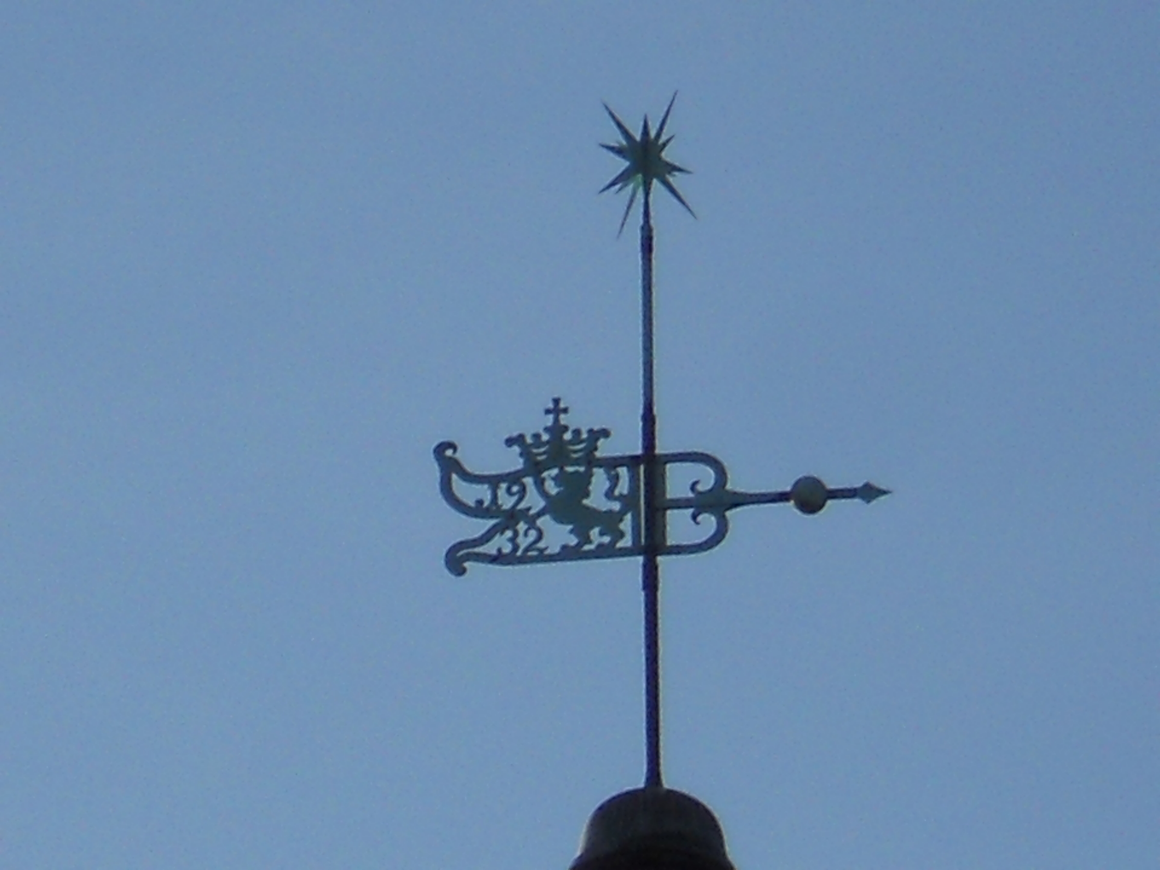 Die Wetterfahne auf dem Kirchturm in Löben